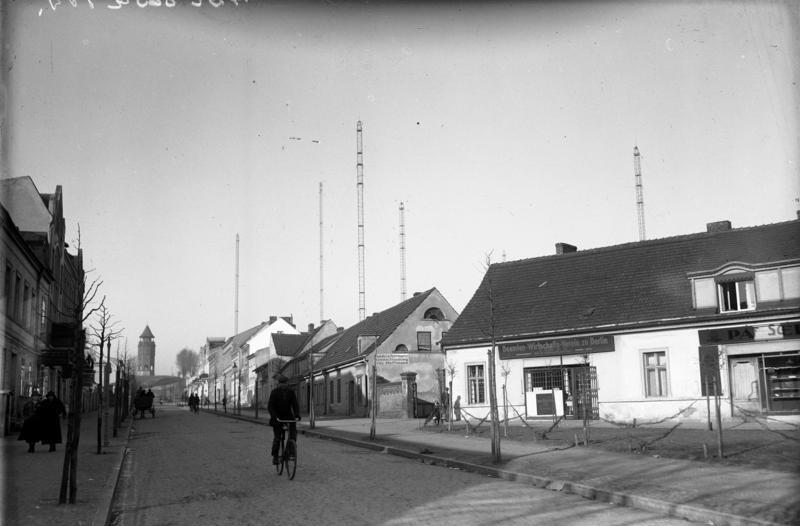 Königswusterhausen mit den Funktürmen